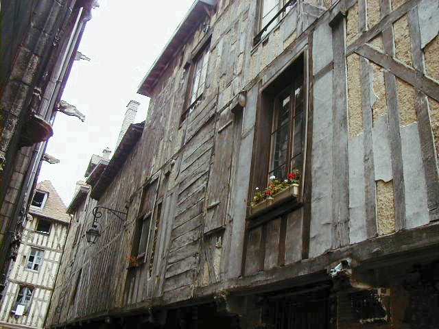 Ur straed vihan e Troyes.